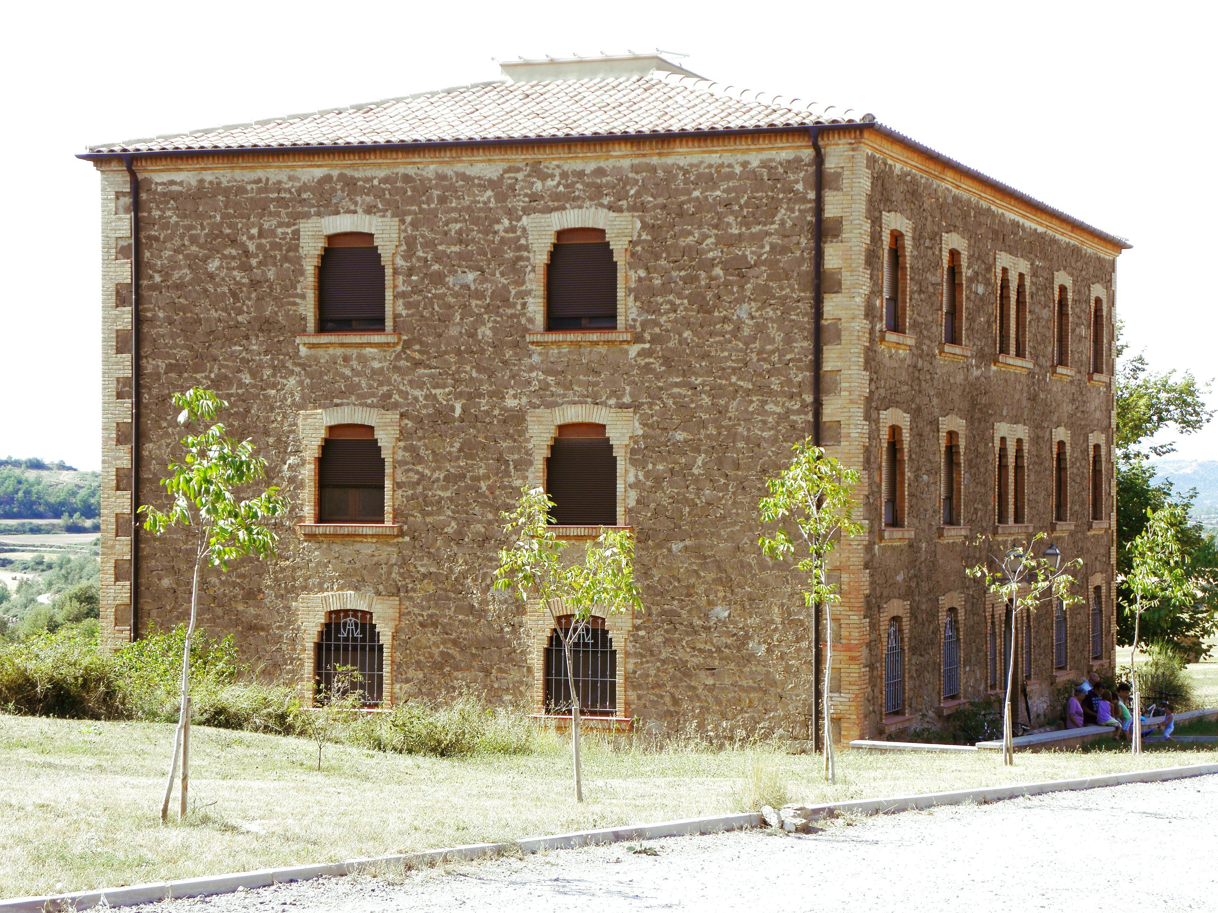 L'edifici de les cel·les de Nostra Senyora, al Santuari d'El Miracle (Riner, Solsonès)